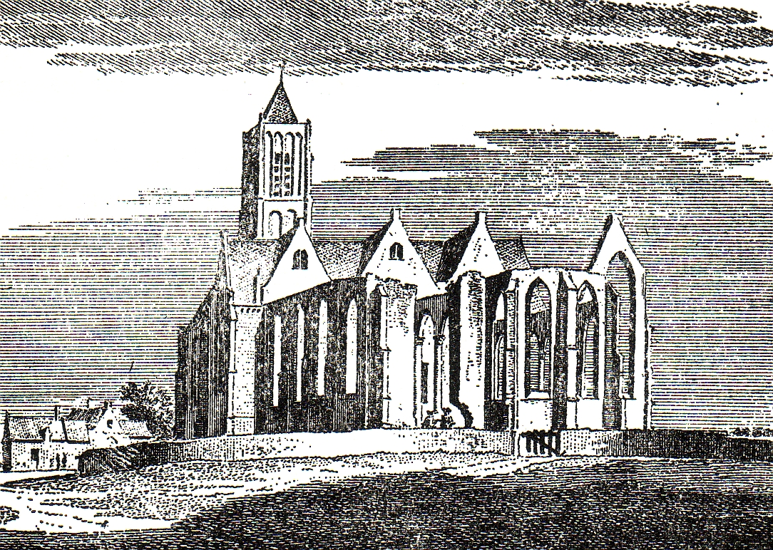 Vuurtoren Westkapelle, Ruine Kirche St. Willibrodus